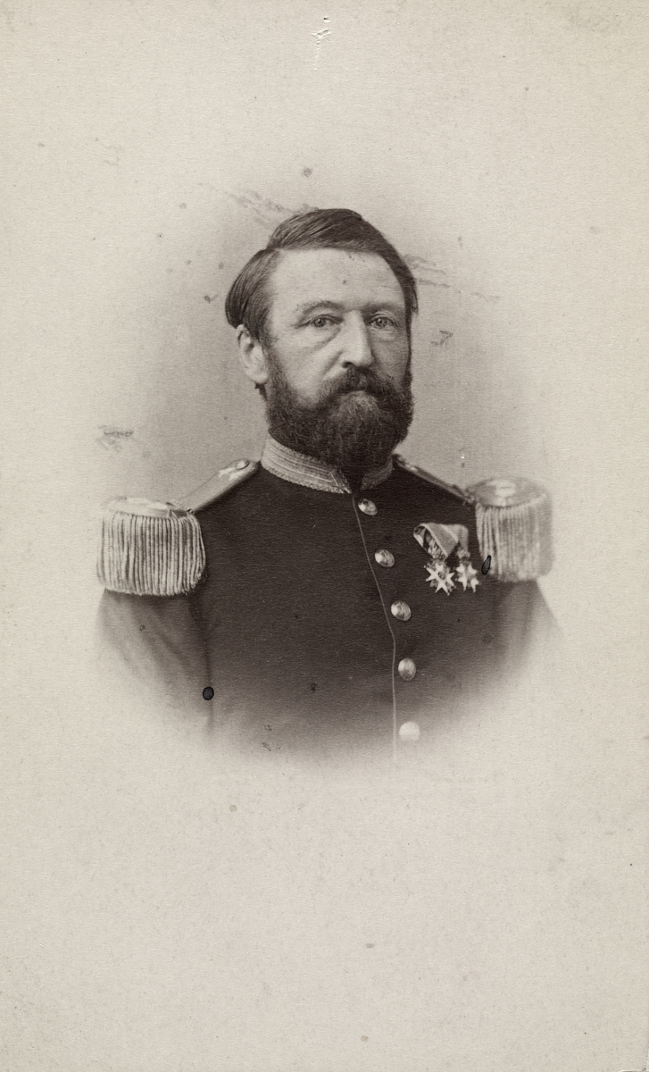 Joseph Frantz Oscar Wergeland, portrett, mann, generalmajor, uniform, vignettert brystbilde.